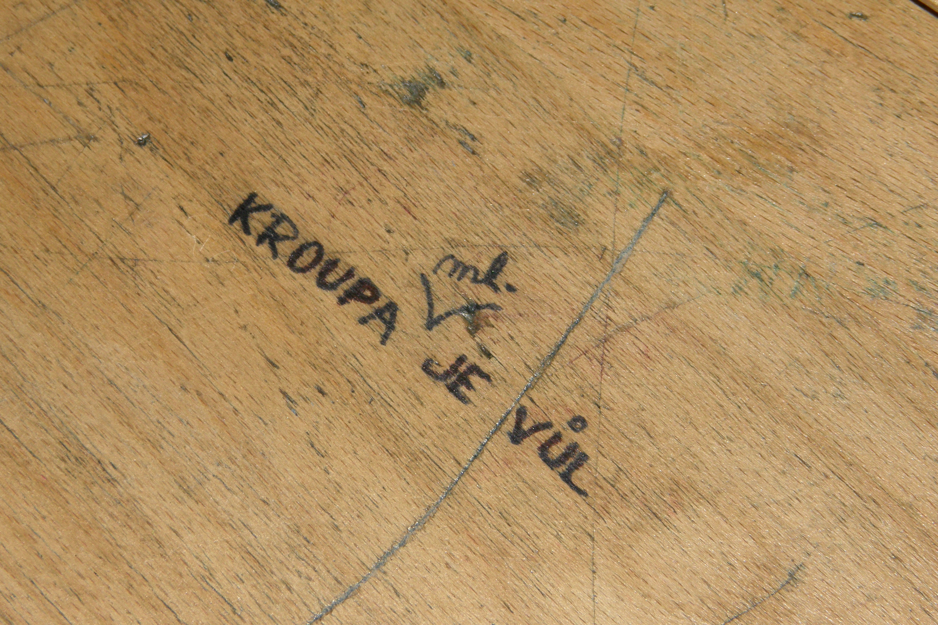 Muzeum HLINÍKárium v Humpolci